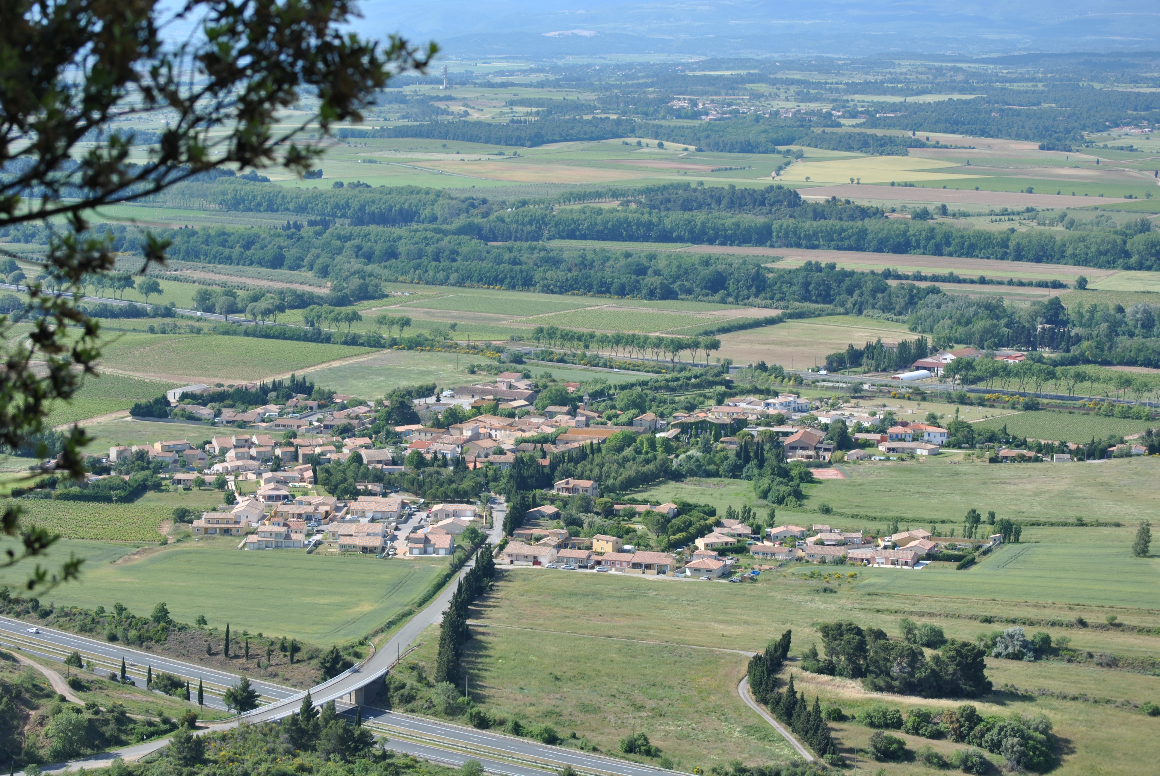 Floure